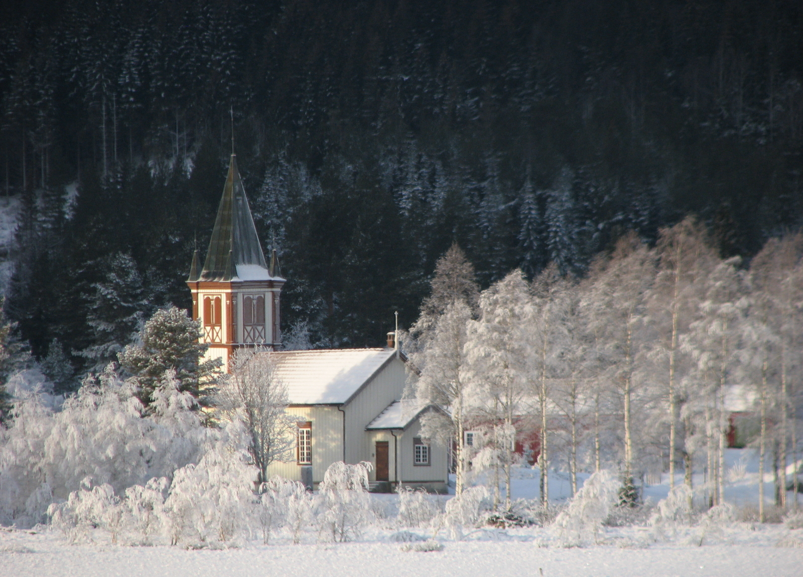 Luksefjell kapell